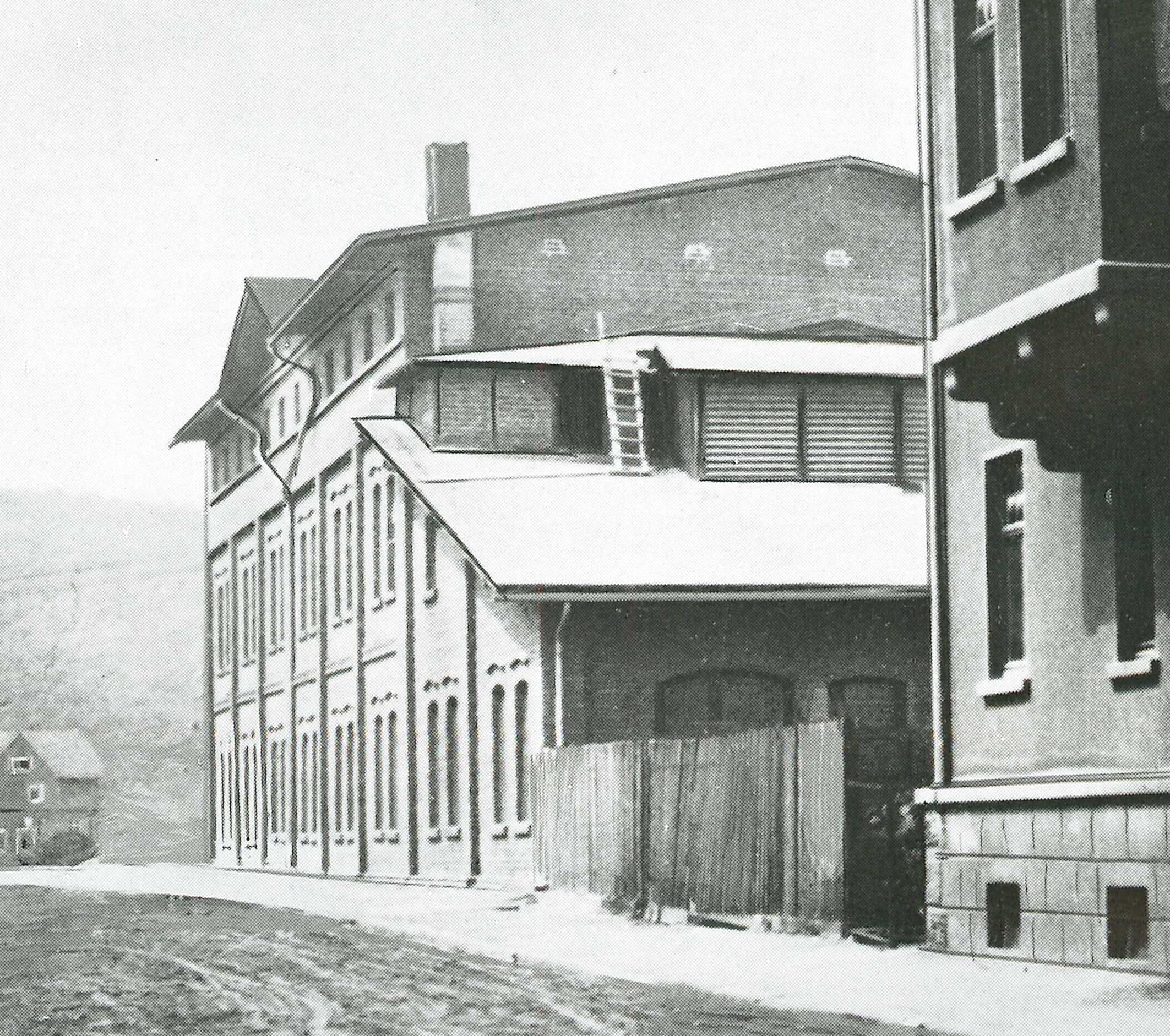 Erster Firmensitz der 1893 gegründeten Leimfabrik in Siegen, fotografiert 1902